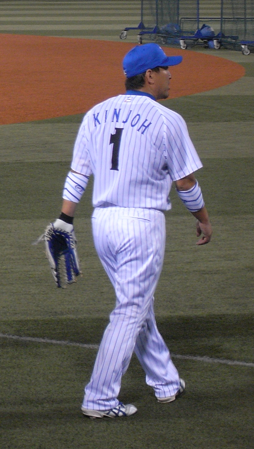 Tatsuhiko Kinjoh (金城龍彦)